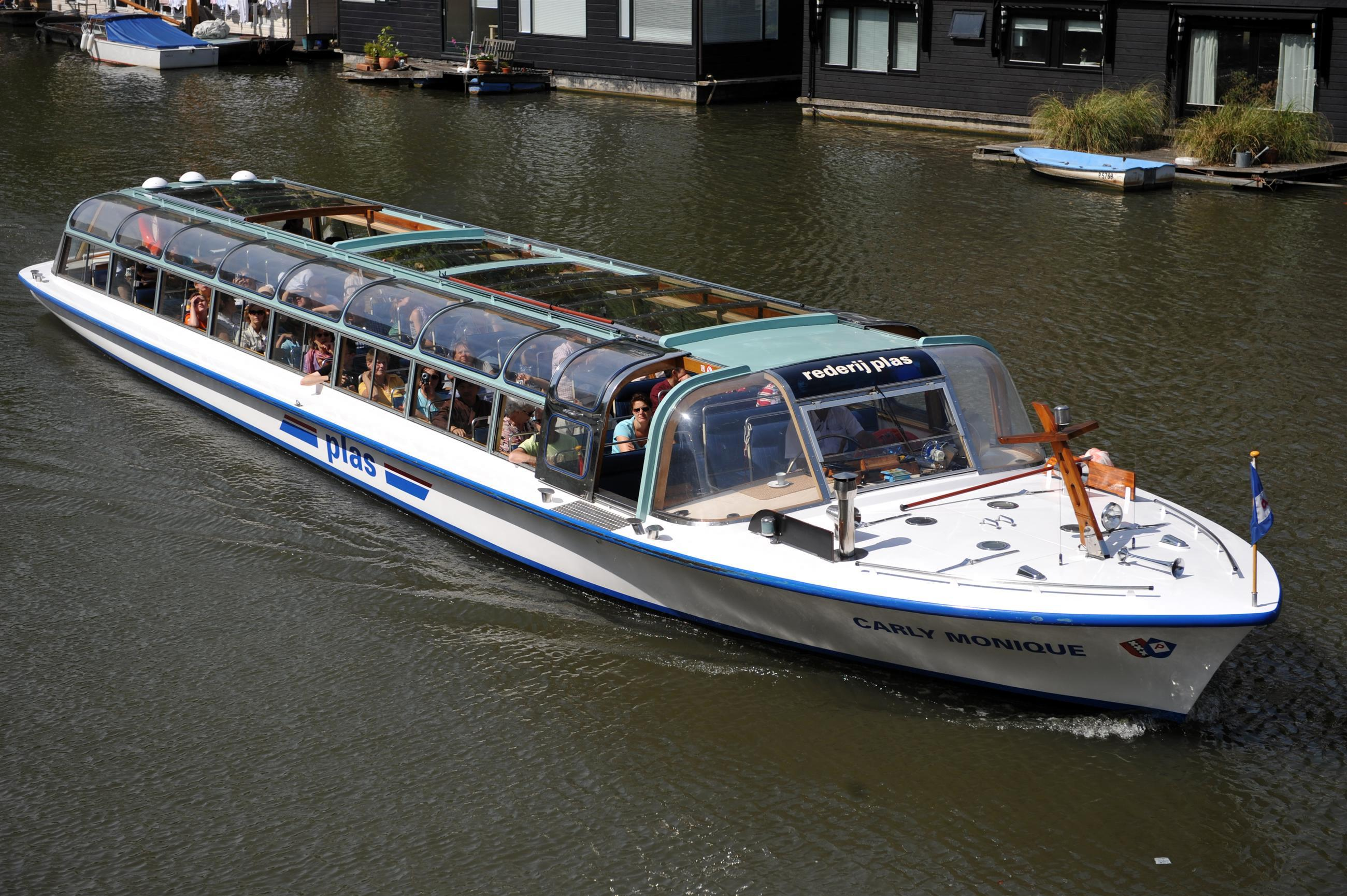 Autobus wodny w Amsterdamie Information about the vessel may be found at ENI 02005452.A ship can change name and flag state through time, but the ENI number remains the same through the hull's entire lifetime. As a result, it can be useful to identify a ship by using the ENI number.